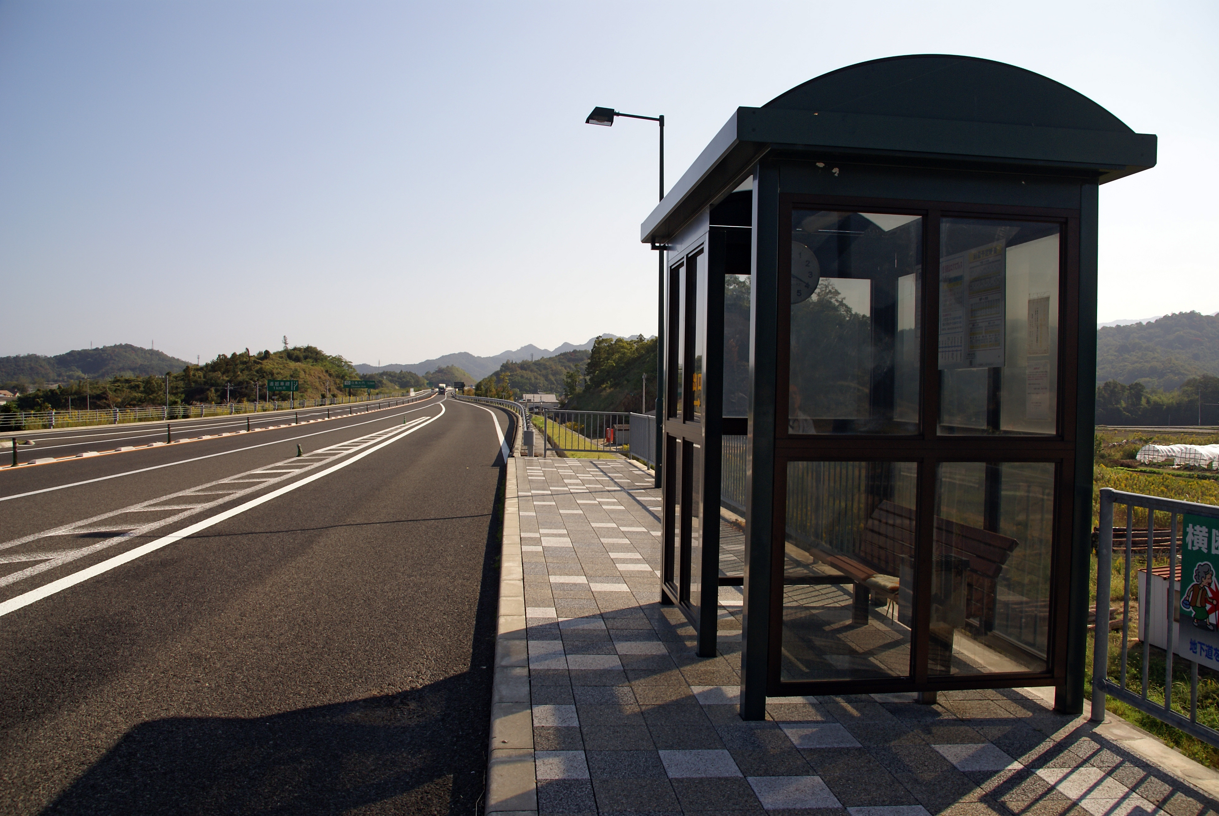 Takamatsu Expressway Ochi bus stop in Higashikagawa, Kagawa prefecture, Japan